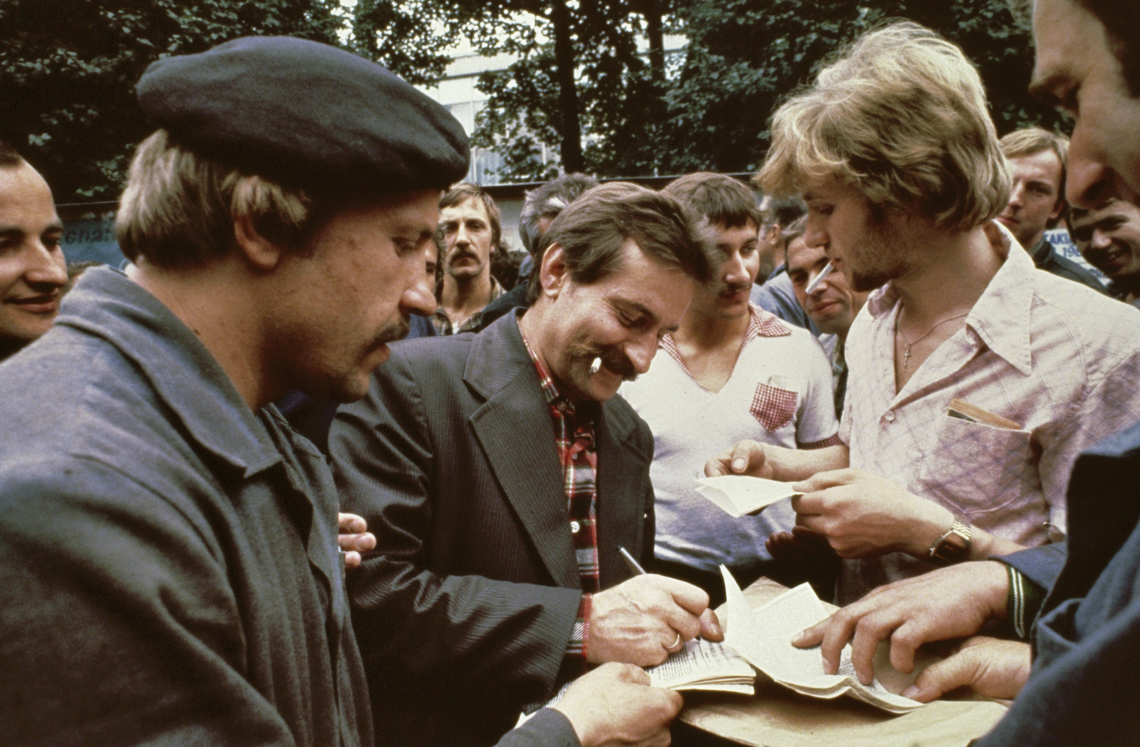 Collectie / Archief : Fotocollectie Anefo Reportage / Serie : Stakingen in Polen 1980: Leninwerf Gdansk Beschrijving : Stakingsleider Lech Walesa deelt handtekeningen uit Datum : 31 augustus 1980 Locatie : Gdansk, Polen Trefwoorden : handtekeningen, leiderschap, roken, scheepsbouw, stakingen, vakbonden Persoonsnaam : Walesa, Lech Fotograaf : [onbekend] Auteursrechthebbende : Nationaal Archief Materiaalsoort : Dia (kleur) Nummer archiefinventaris : bekijk toegang 2.24.01.06 Bestanddeelnummer : 253-8300